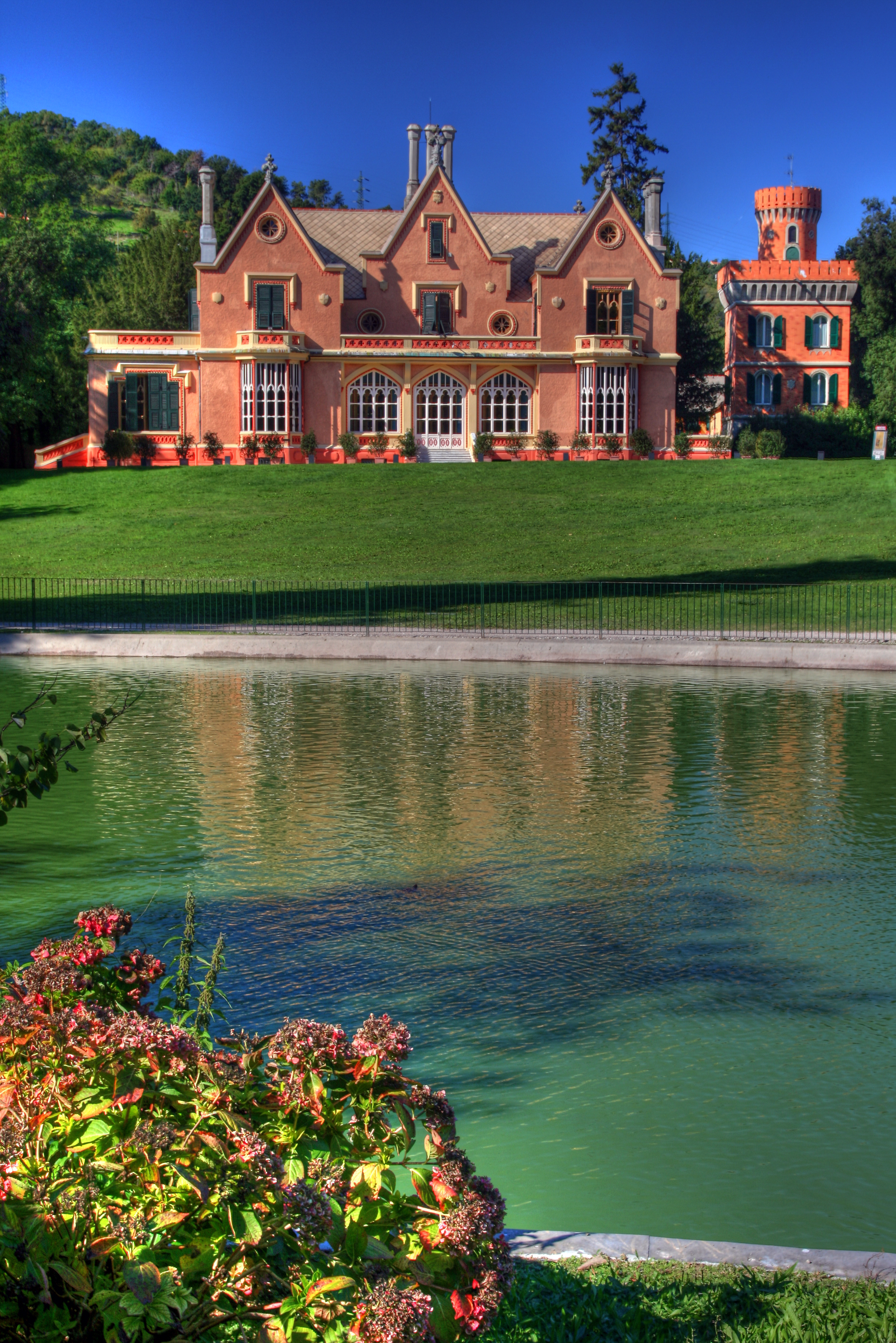 Villa Serra di Comago, Sant'Olcese, LIguria, Italy